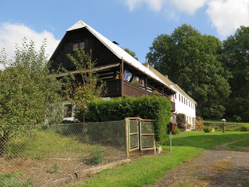 Usedlost čp. 25, Obruby 25, Obruby.